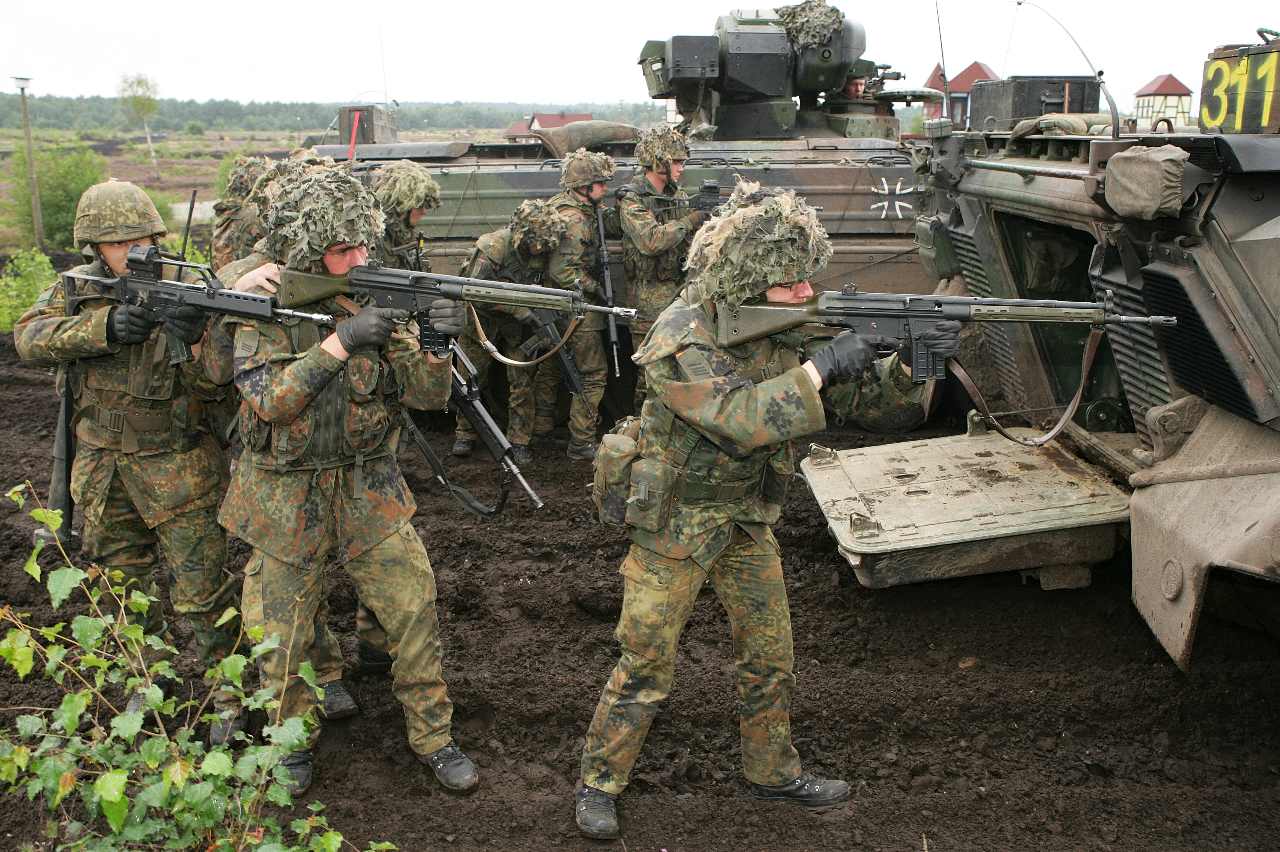 Panzergrenadiere nach dem Wechsel der Kampfweise. Nach dem Verlassen des Schützenpanzer Marder 1A3 nehmen sie Deckung hinter dem Fahrzeug. Die Panzerlehrbrigade 9 stellt vom 4. bis 10. September die Fähigkeiten des deutschen Heeres auf dem Truppenübungsplätzen Munster und Bergen vor. Unterstützt wird die Lehrbrigade dabei vom Ausbildungszentrum Munster. In diesem Jahr wird das heutige und zukünftige Aufgabenspektrum des deutschen Heeres in dieser Lehrübung dargestellt. Die Informationslehrübung richtet sich in erster Linie an den Führernachwuchs der Bundeswehr, der Offizierschule des Heeres und Soldaten ausländischer Streitkräfte. ©Bundeswehr/Mandt